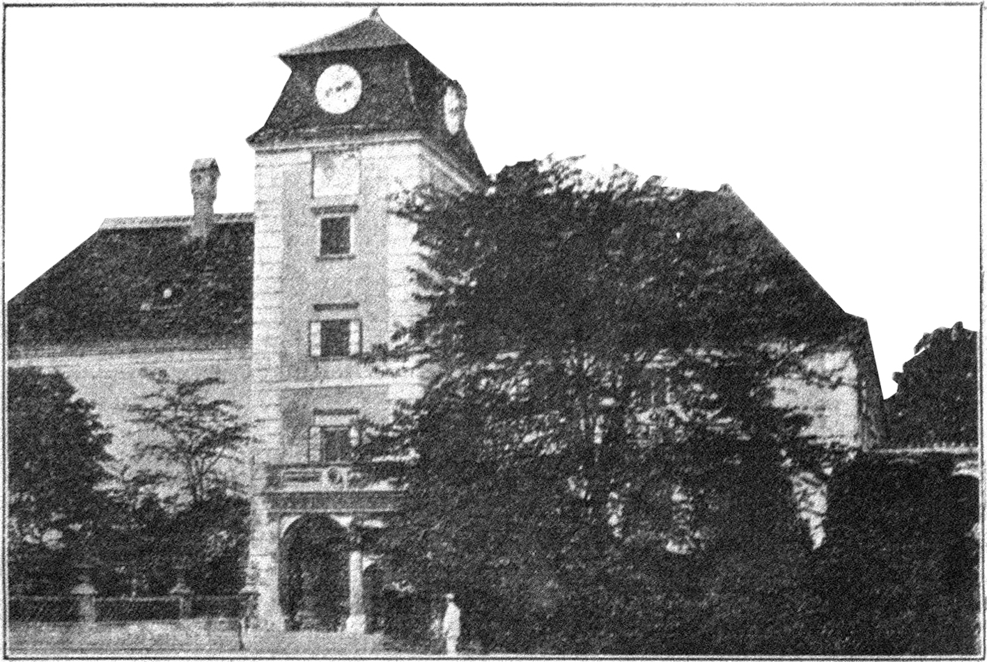 Baden bei Wien, Schloss Weikersdorf